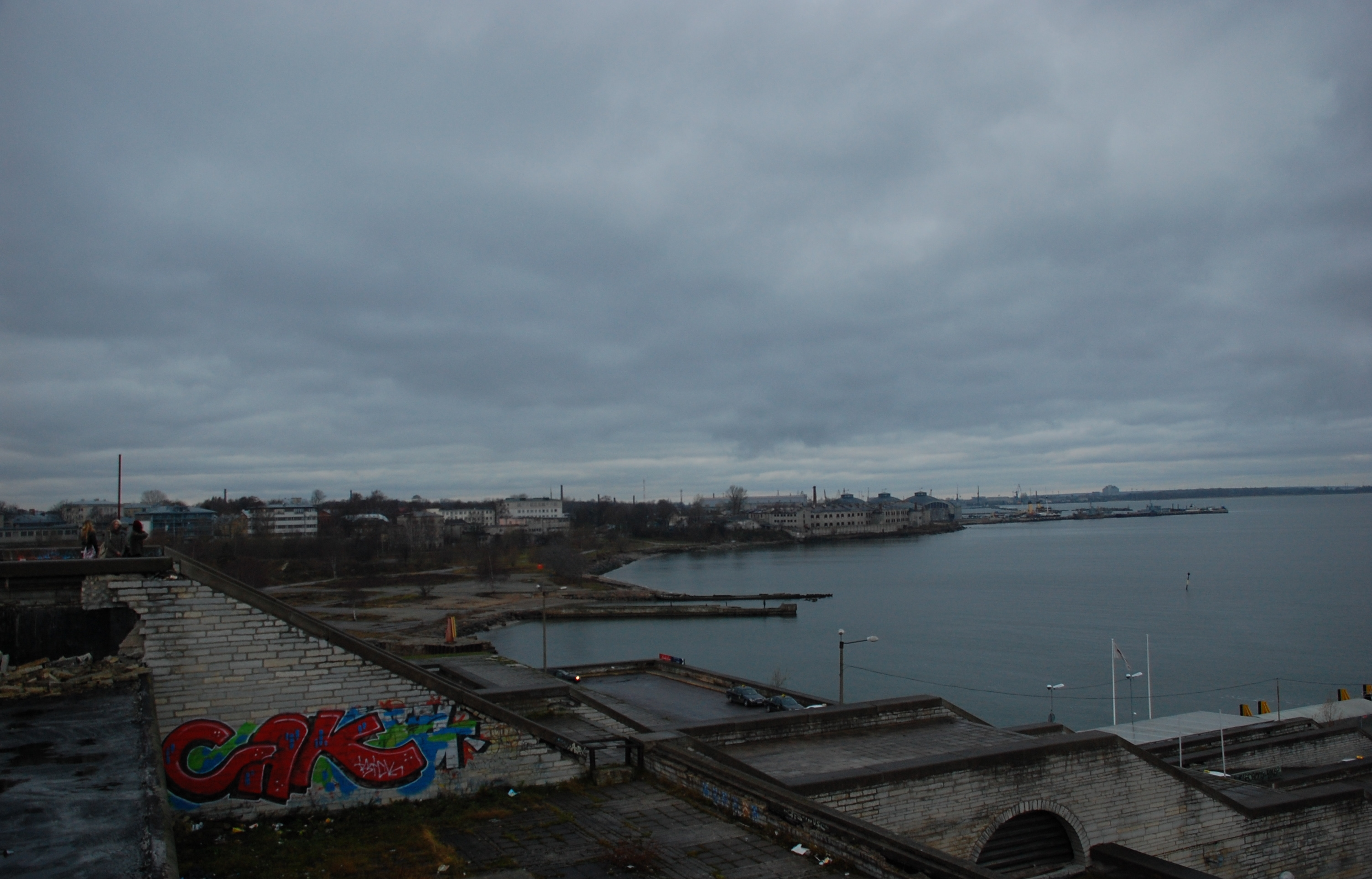 Tallinna Linnahall